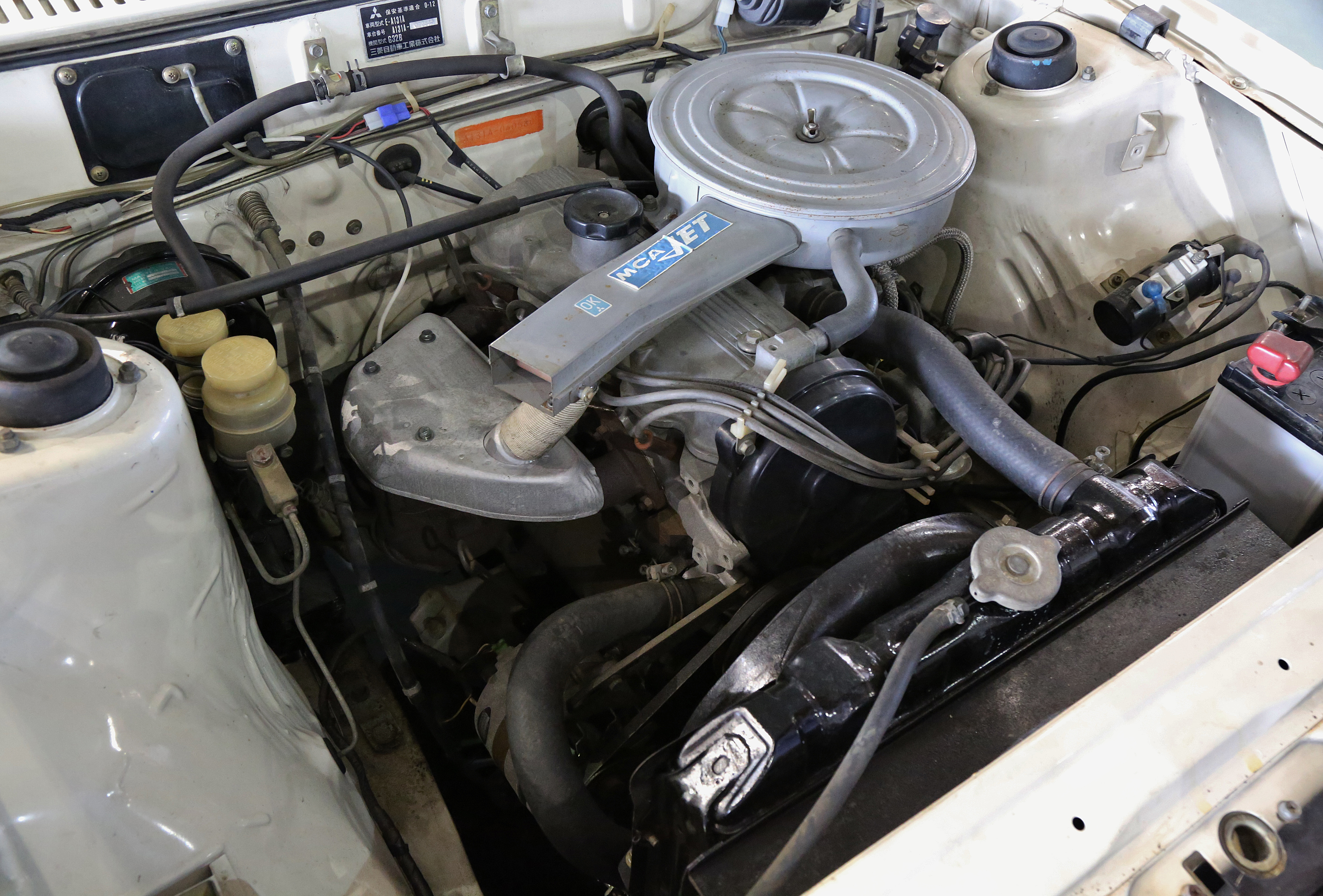 Mitsubishi Galant Sigma